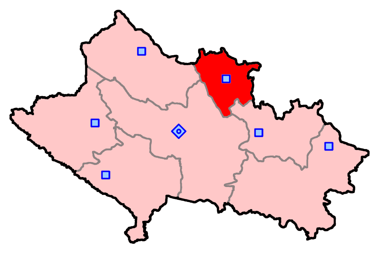 حوزه‌ بروجرد برای انتخابات مجلس شورای اسلامی